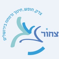 לוגו העמותה